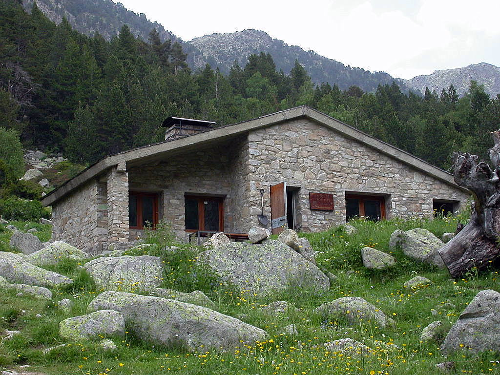 Refuges Andorre Refugi de Fontverd